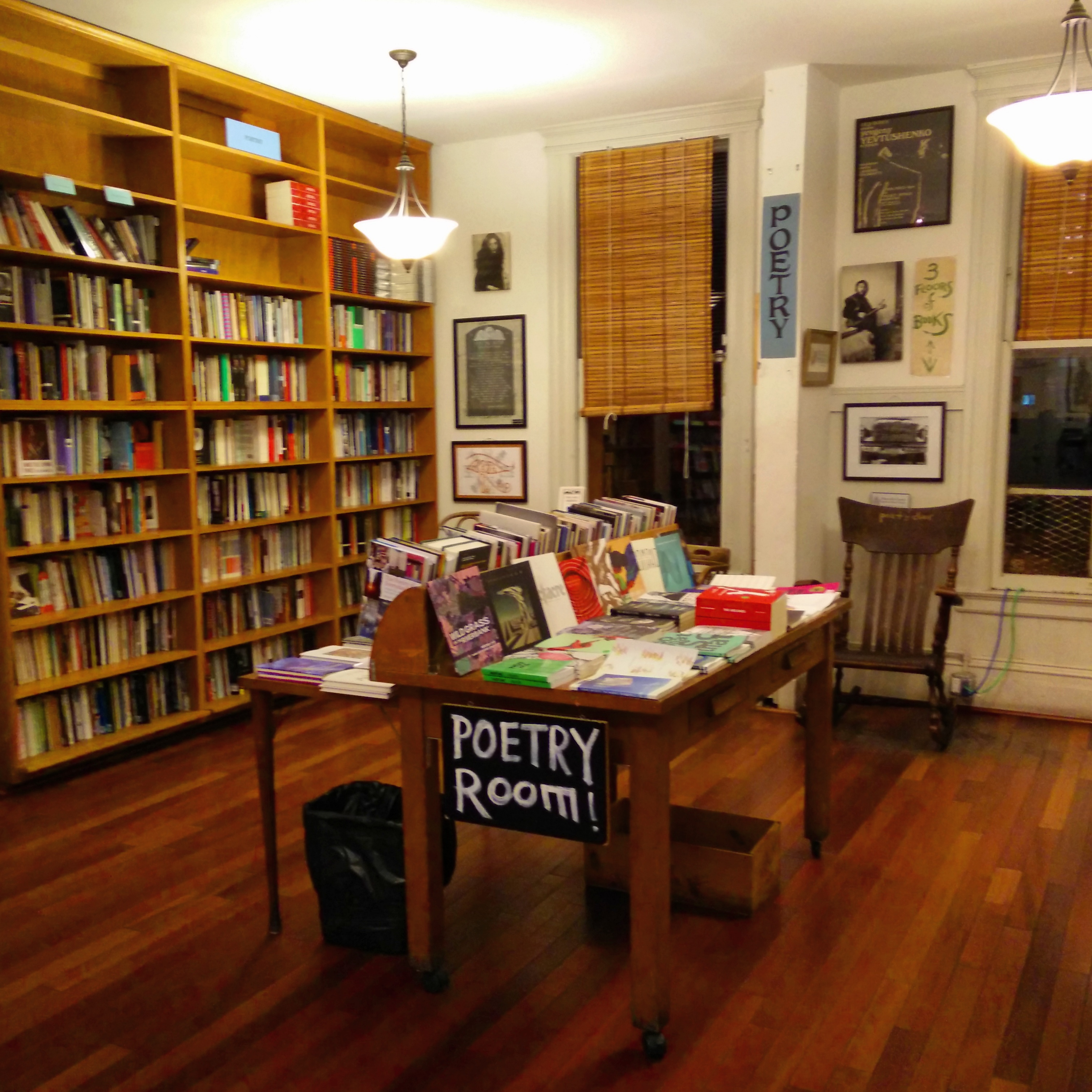 Poesirummet i bokhandeln City Lights i San Francisco, januari 2017.